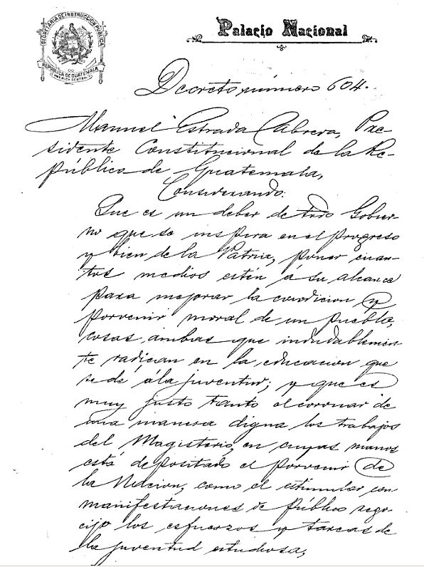 Decreto 604 de la creación de las Fiestas de Minerva en Guatemala, 1899.